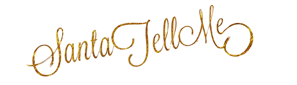 Texto utilizado en la portada del sencillo de Grande